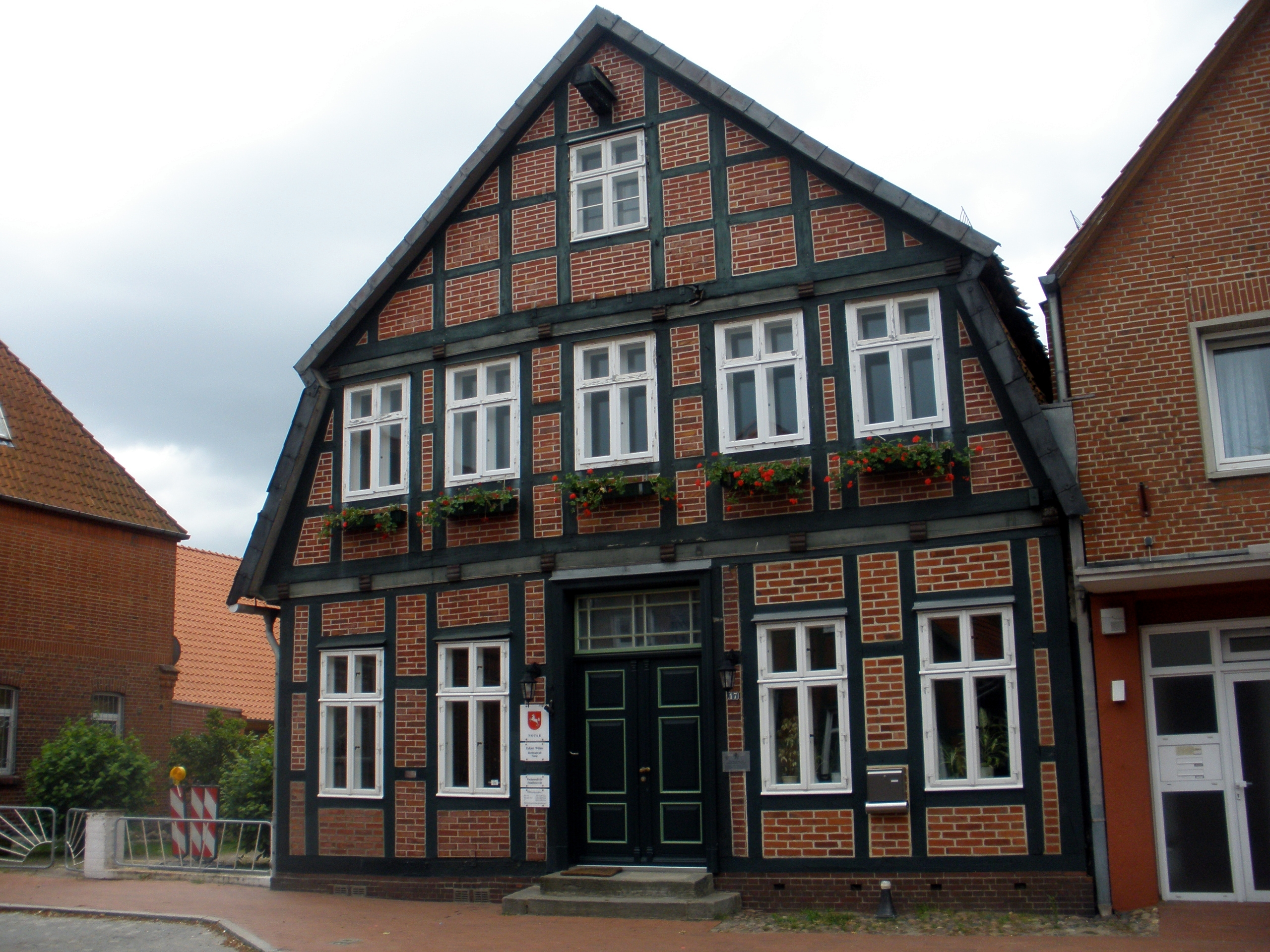 Ehemaliger Betsaal der jüdischen Gemeinde Bleckede